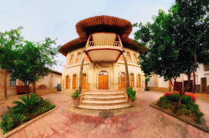 خانه تاریخی تقوی - گرگان